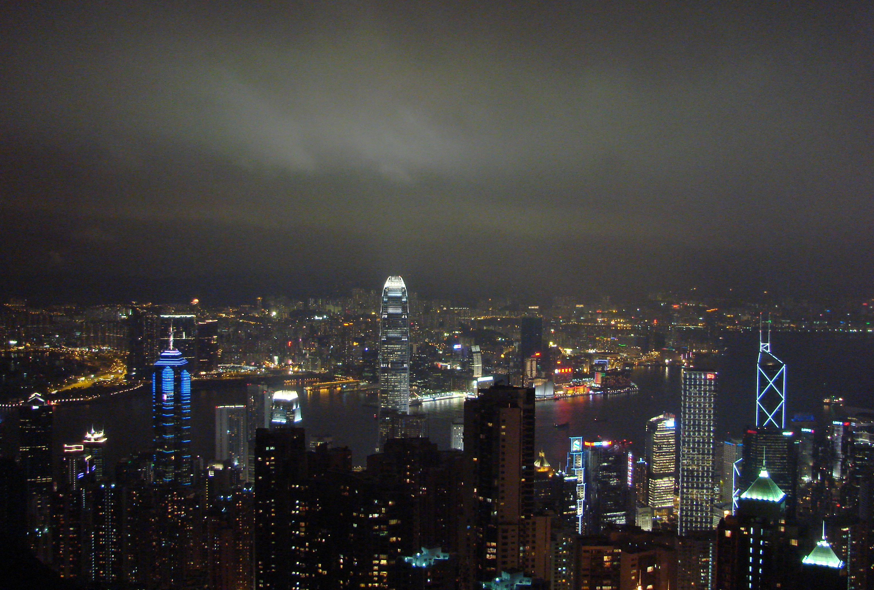 Hong Kong at night